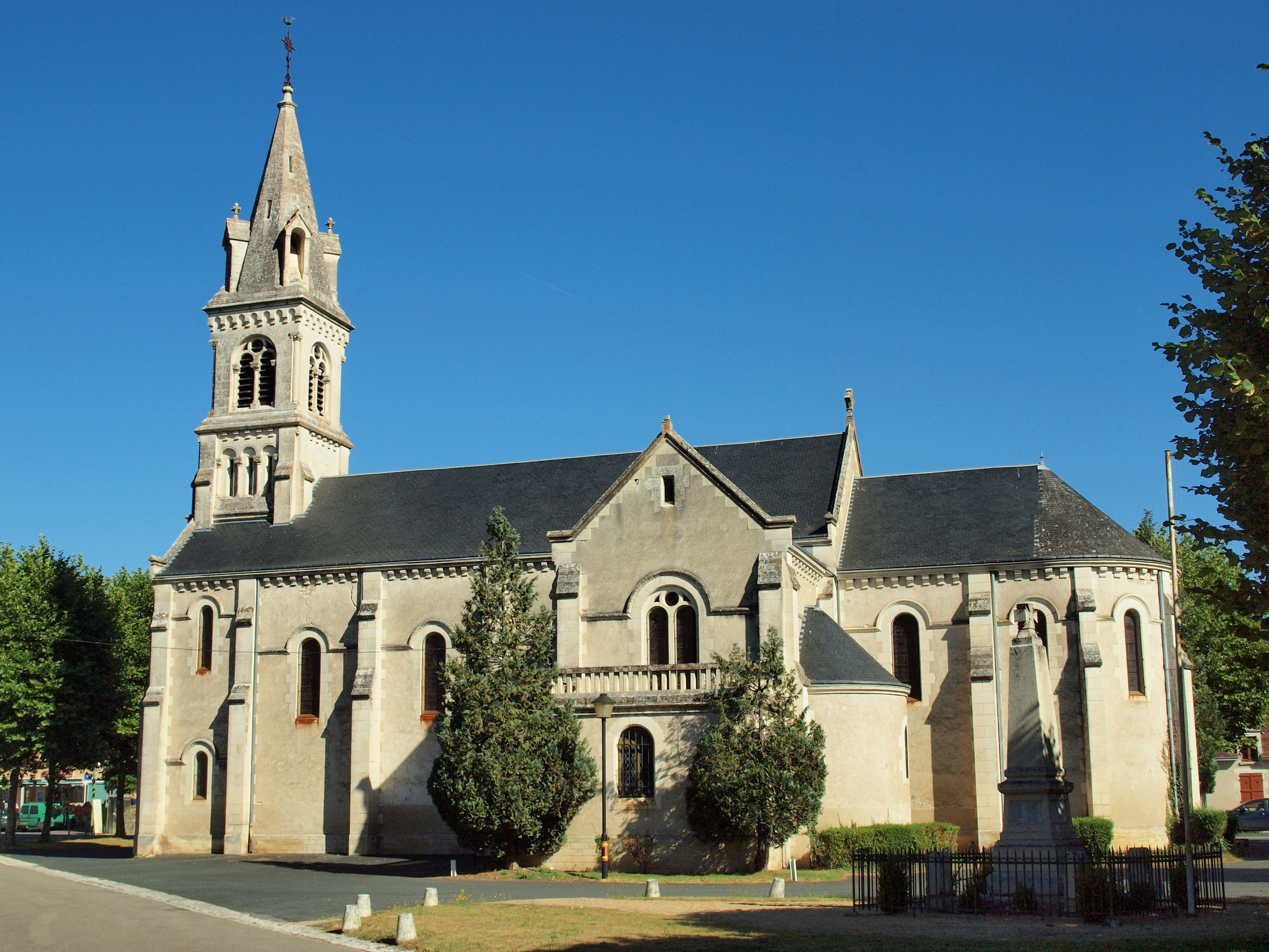 église paroissiale Saint-Alpinien de Ruffec (Indre, France)